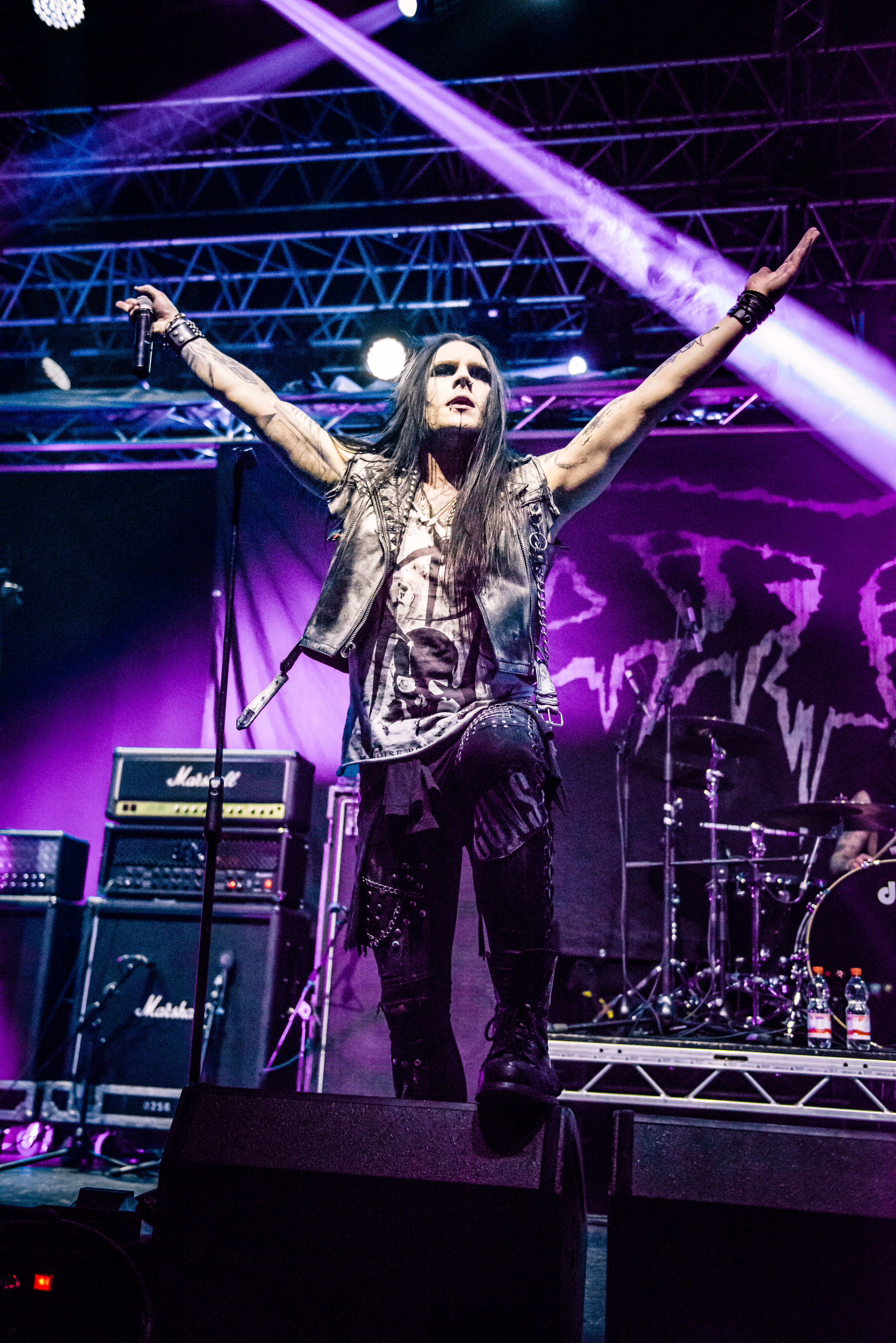 'Ruhrpott Metal Meeting 2016; Oberhausen Turbinenhalle': 'Sister'